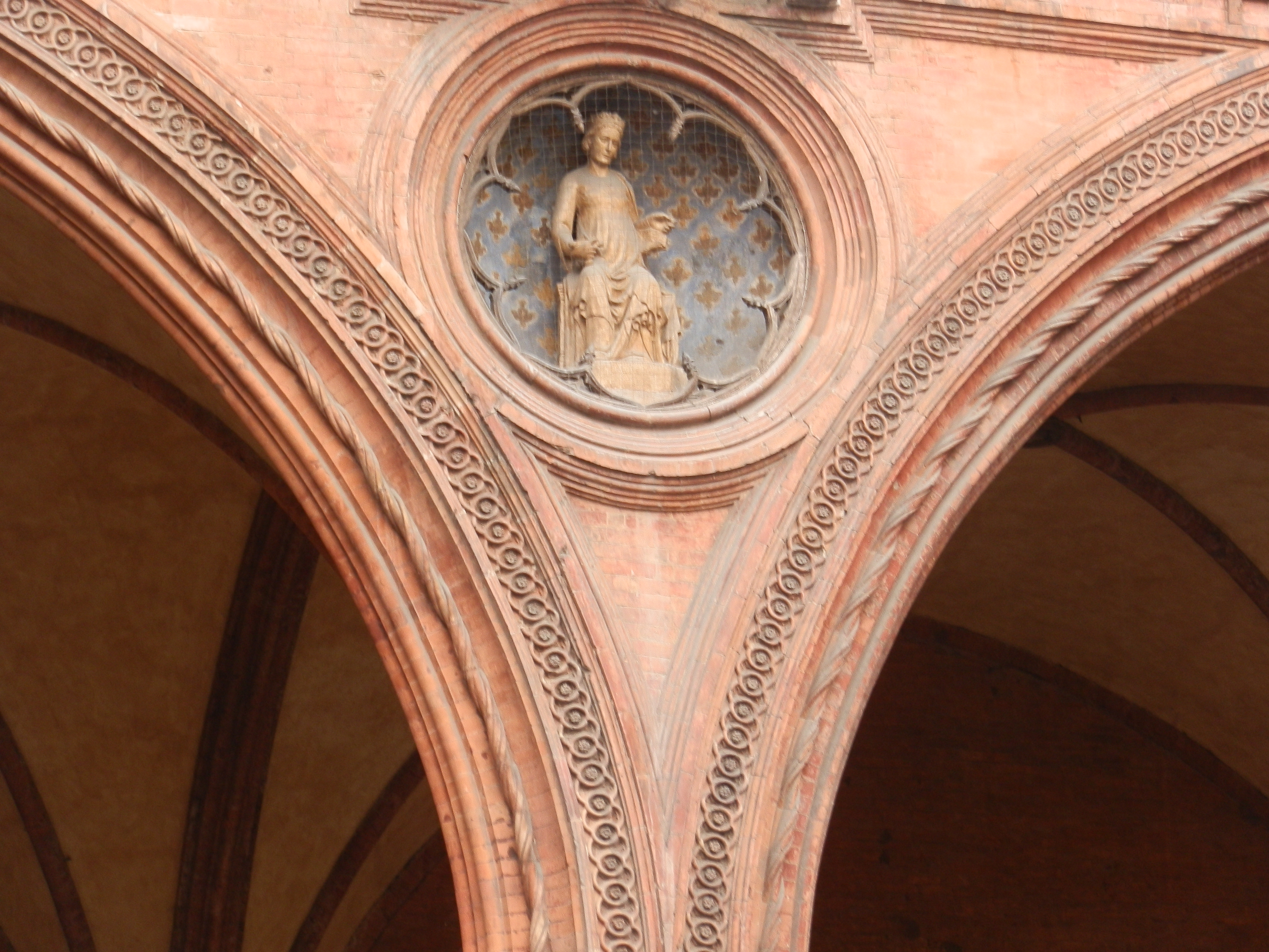 Piazza della Mercanzia - MIBAC This is a photo of a monument which is part of cultural heritage of Italy.